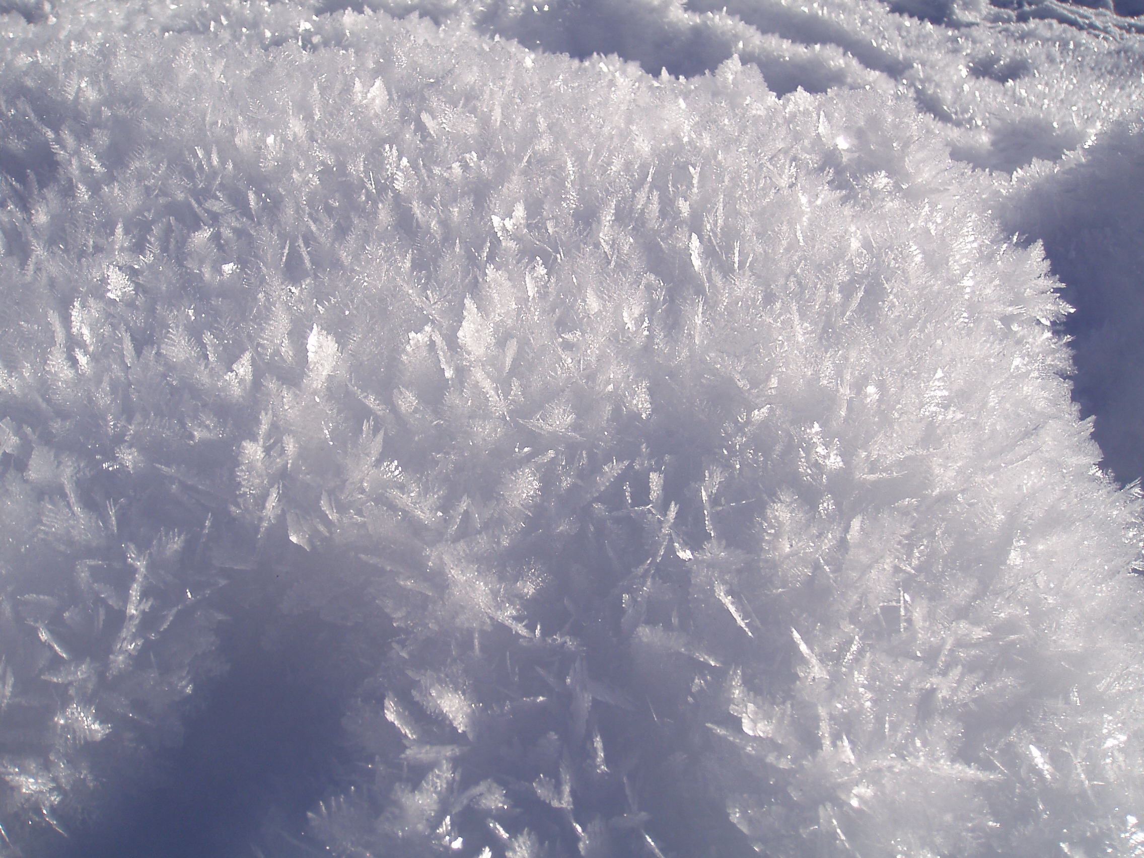 Taken in Megeve, France